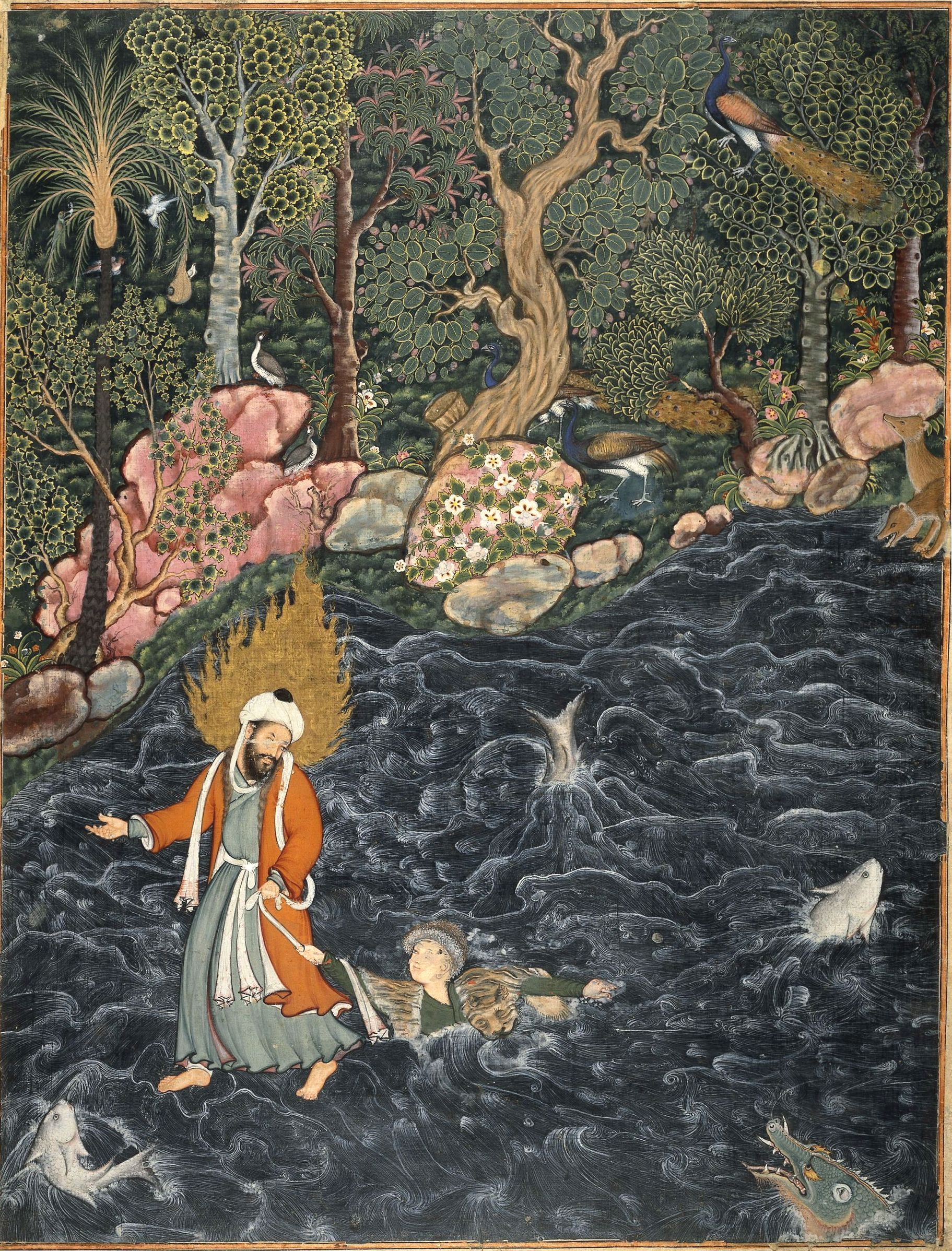 Илья пророк спасает тонущего Нур ад-Дахра. Хамзанаме.